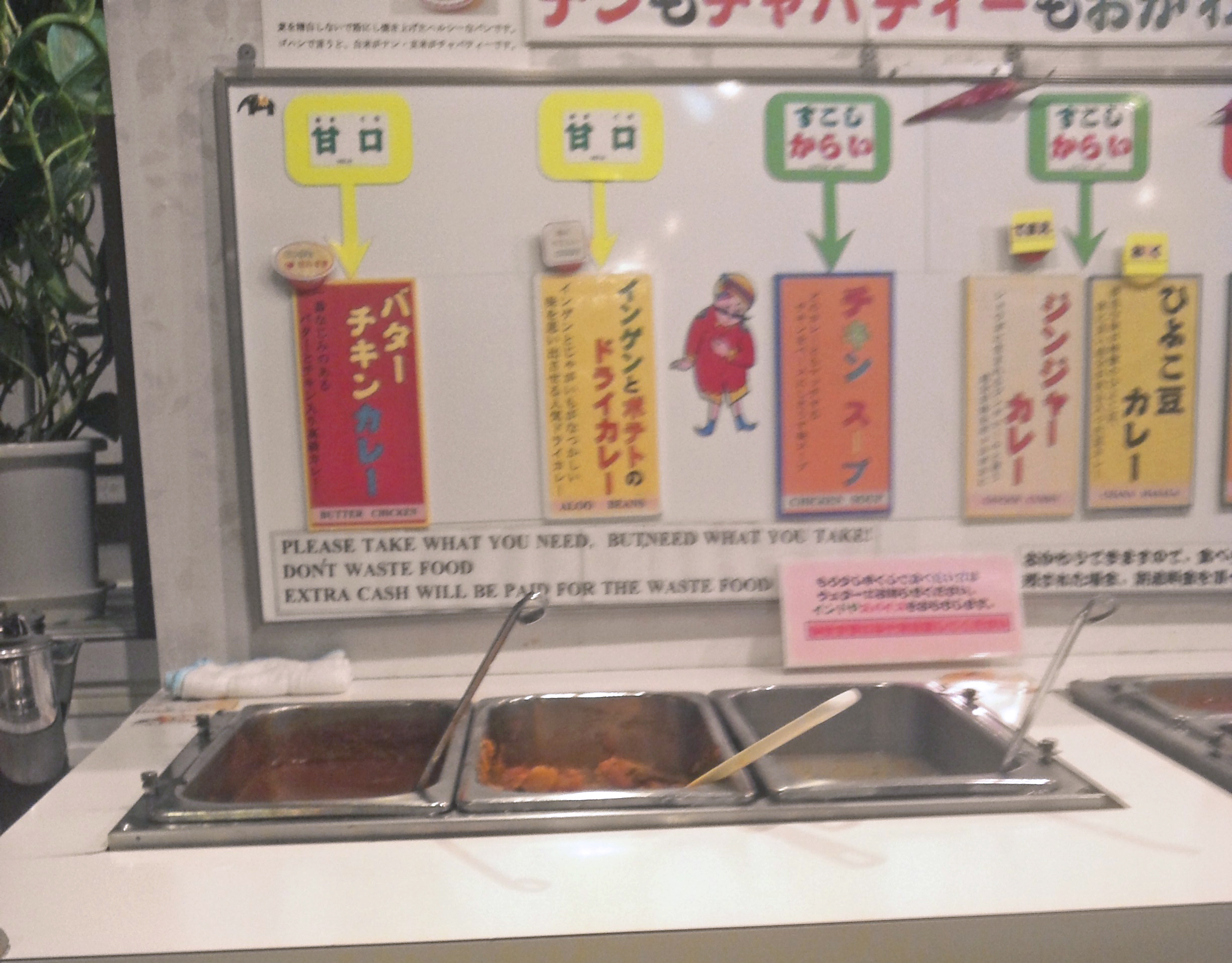 自撮画像